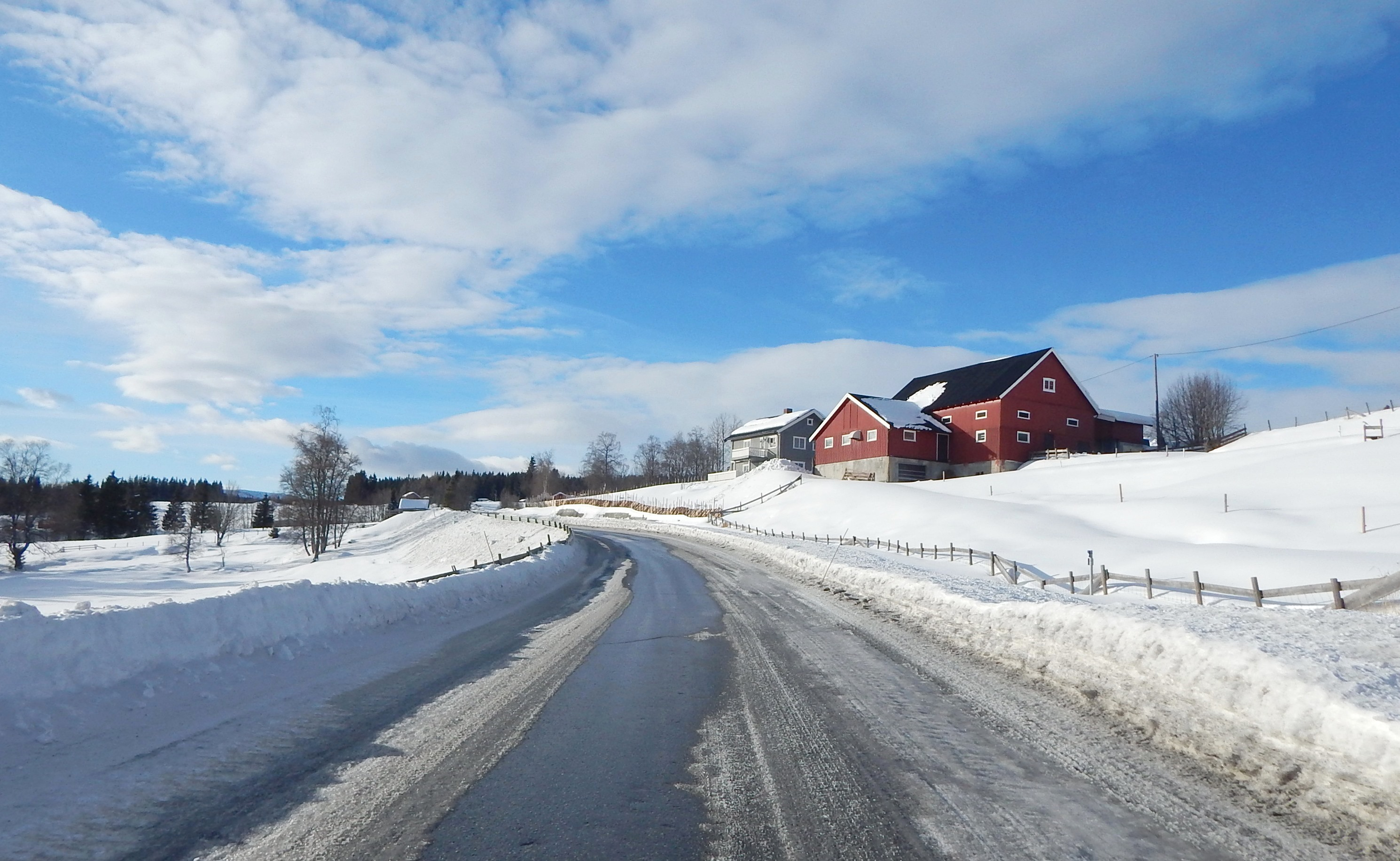 Primær fylkesvei 254 i Musdal